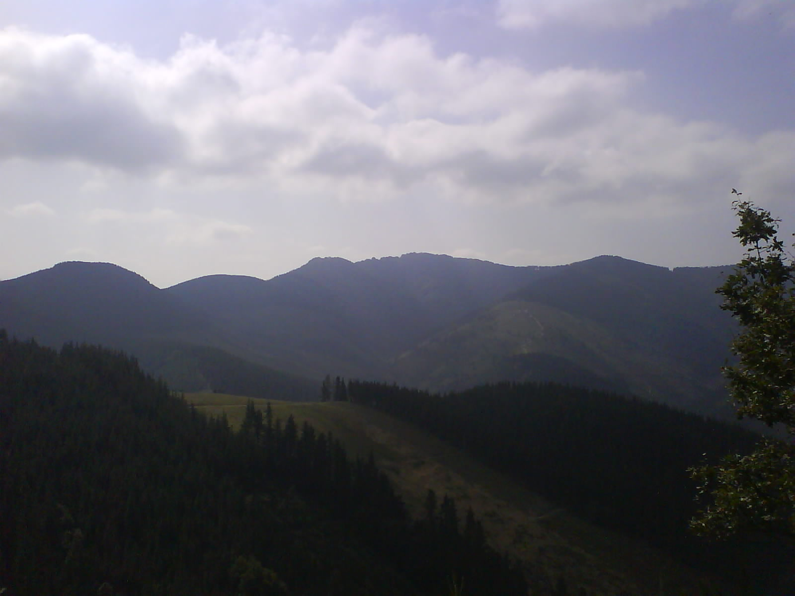 Belamendi. País Vasco España